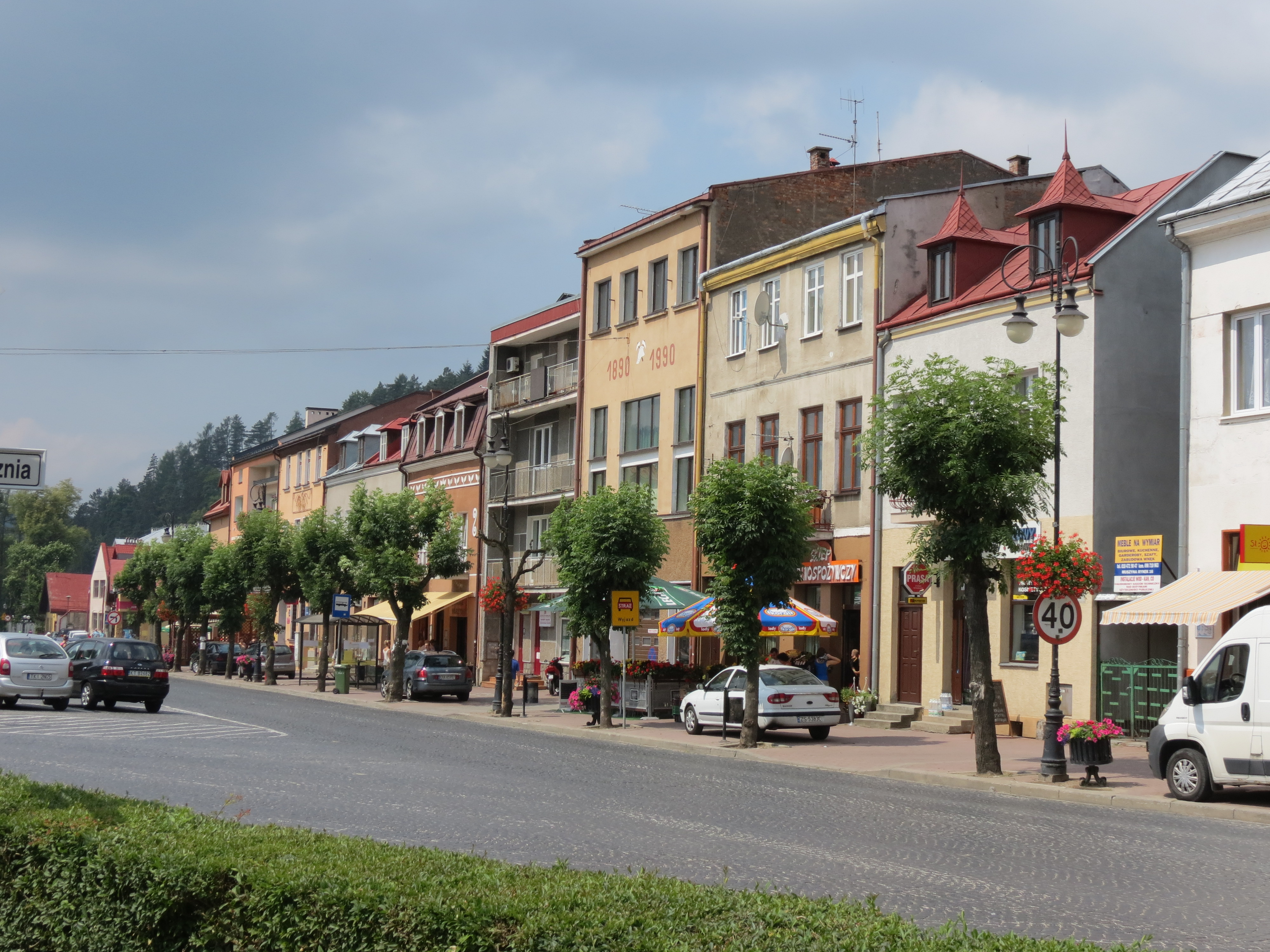 Muszyna, zespół urbanistyczny miasta, XIX